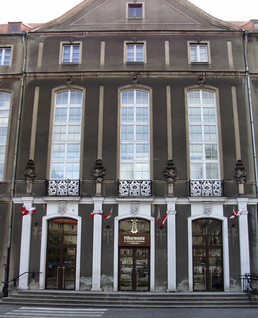 Wejście do filharmonii w Szczecinie (gmach Urzędu Miasta Szczecin)